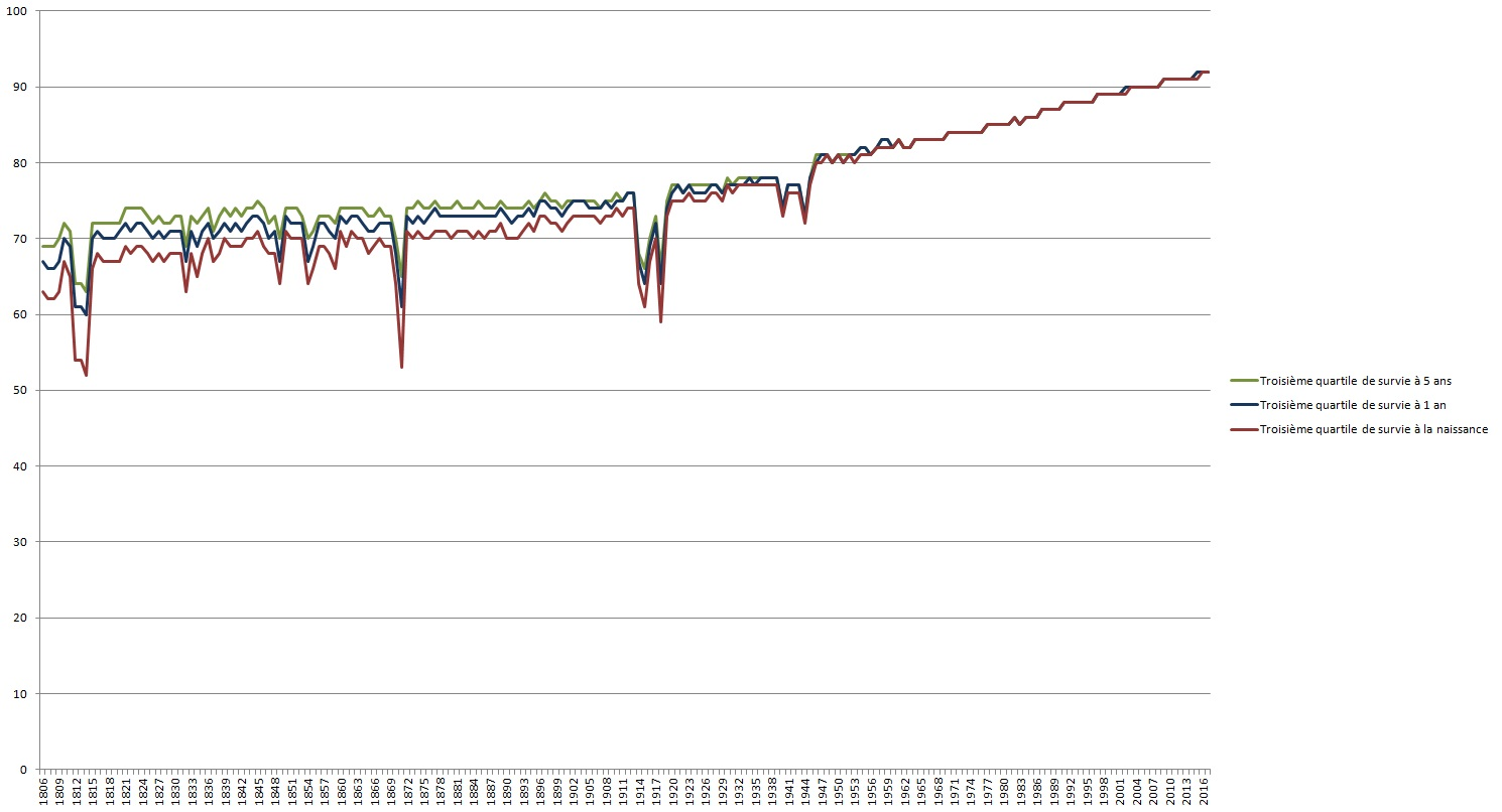 Évolution du troisième quartile de survie en France de 1806 à 2017 (Source: INED) Définitions: - Troisième quartile de survie à la naissance: âge à partir duquel 75% de la population est morte. - Troisième quartile de survie à 1 an: âge à partir duquel 75% de la population ayant survécu au moins 1 an est morte. - Troisième quartile de survie à 5 ans: âge à partir duquel 75% de la population ayant survécu au moins 5 ans est morte.